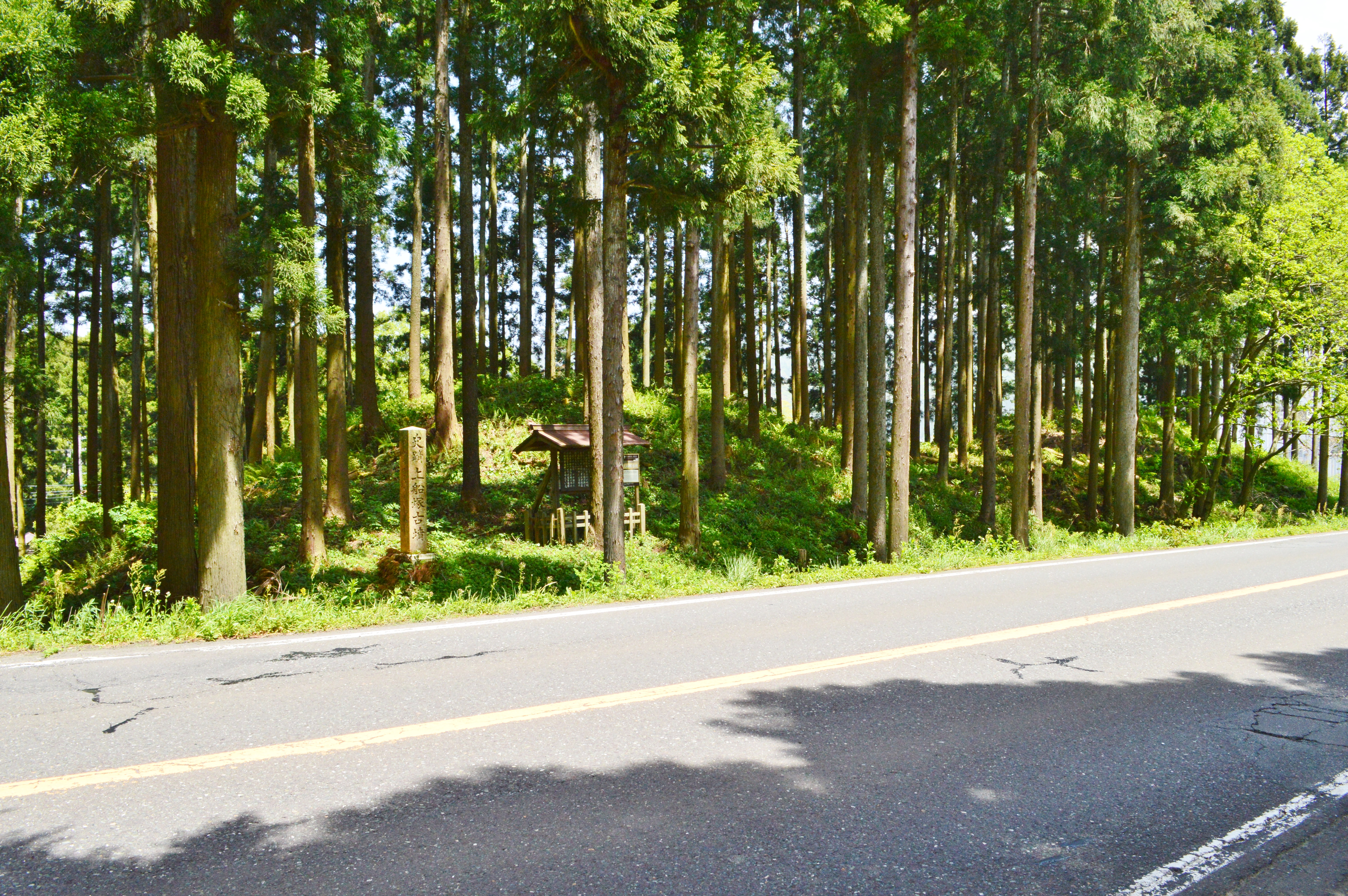 上船塚古墳 墳丘全景